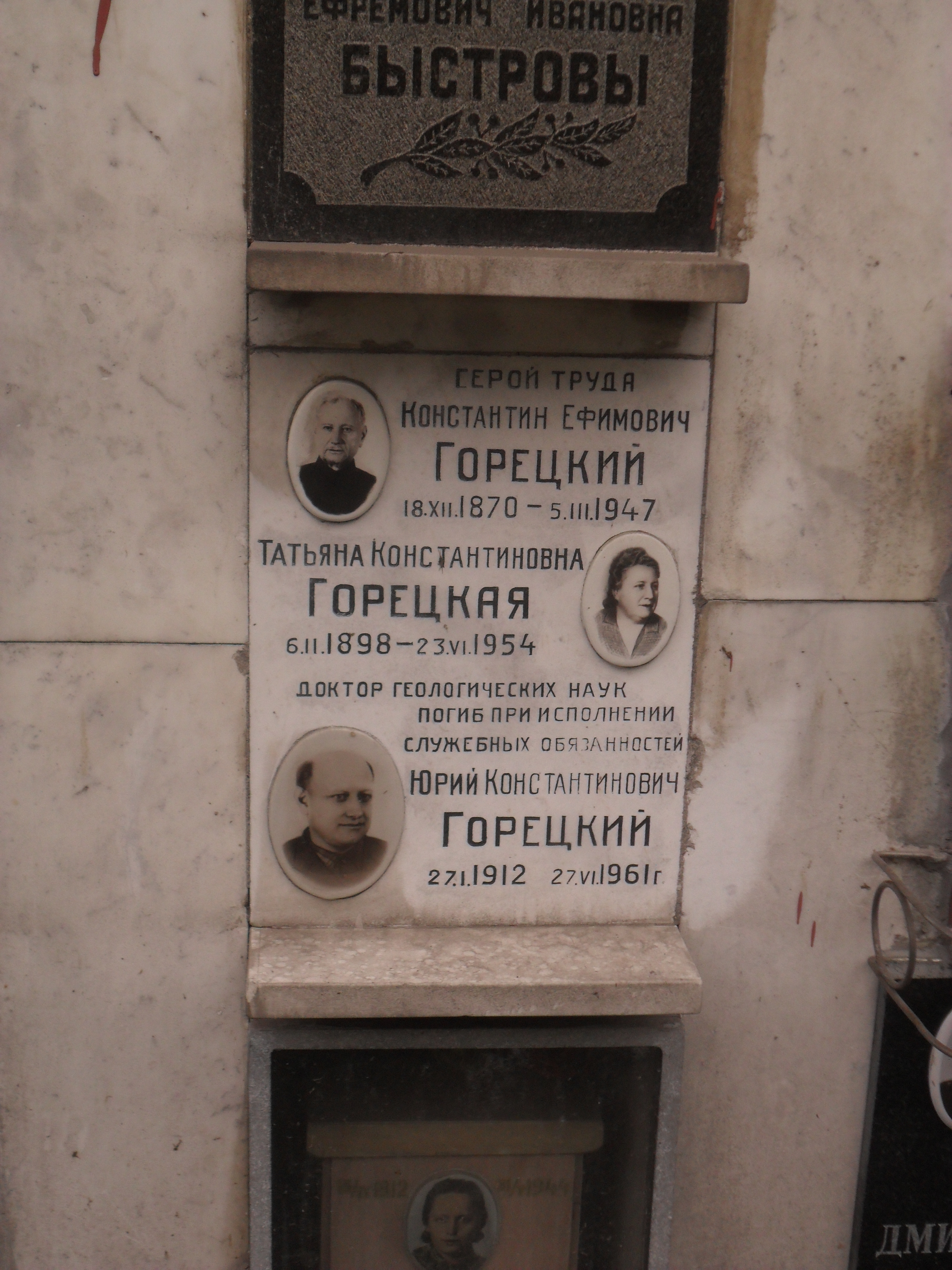 Плита колумбария Героя Труда Константина Горецкого на Новодевичьем кладбище Москвы.